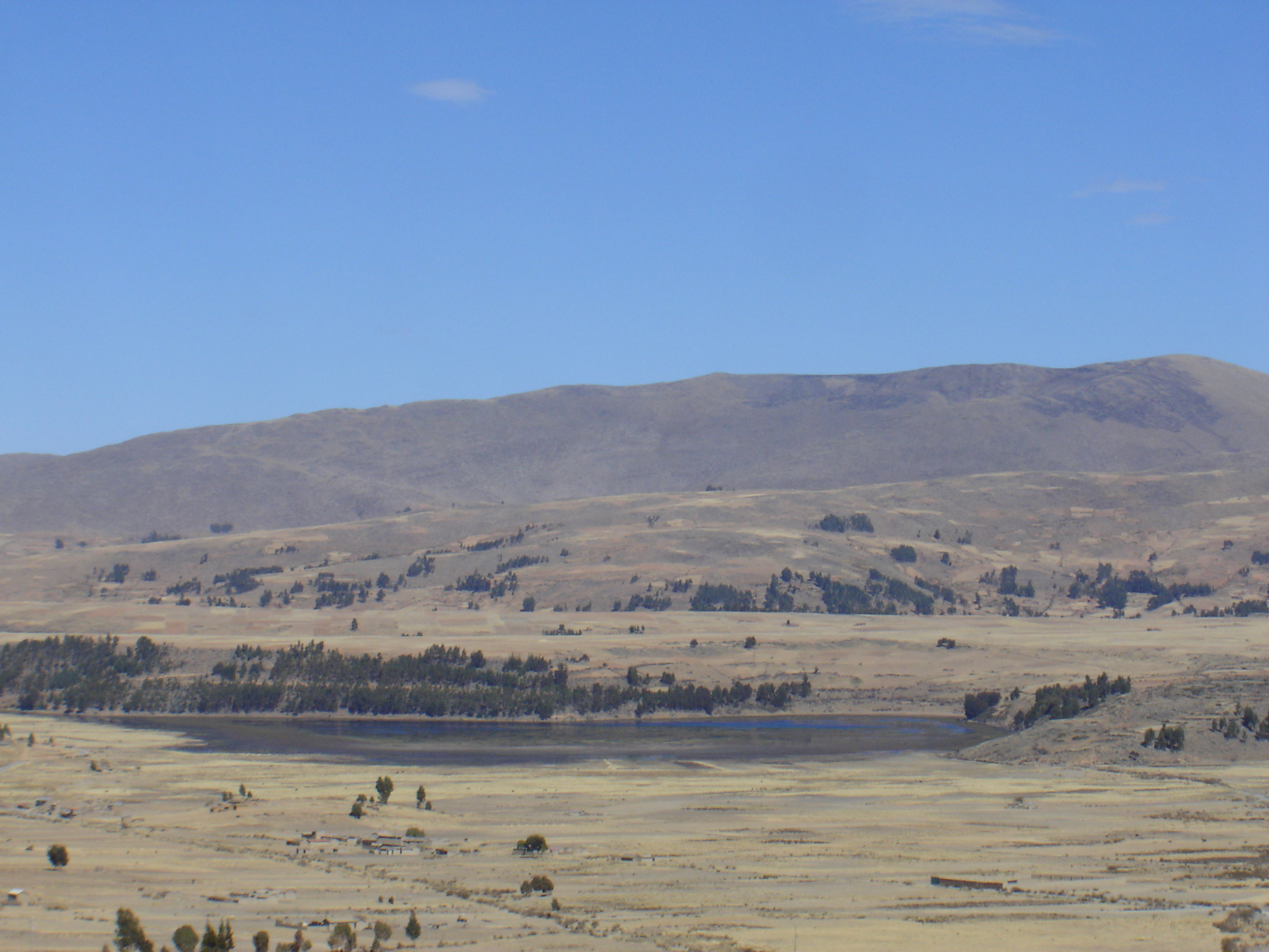 La Laguna Pilawit'u, se encuentra al sud este de la Población de Vacas.